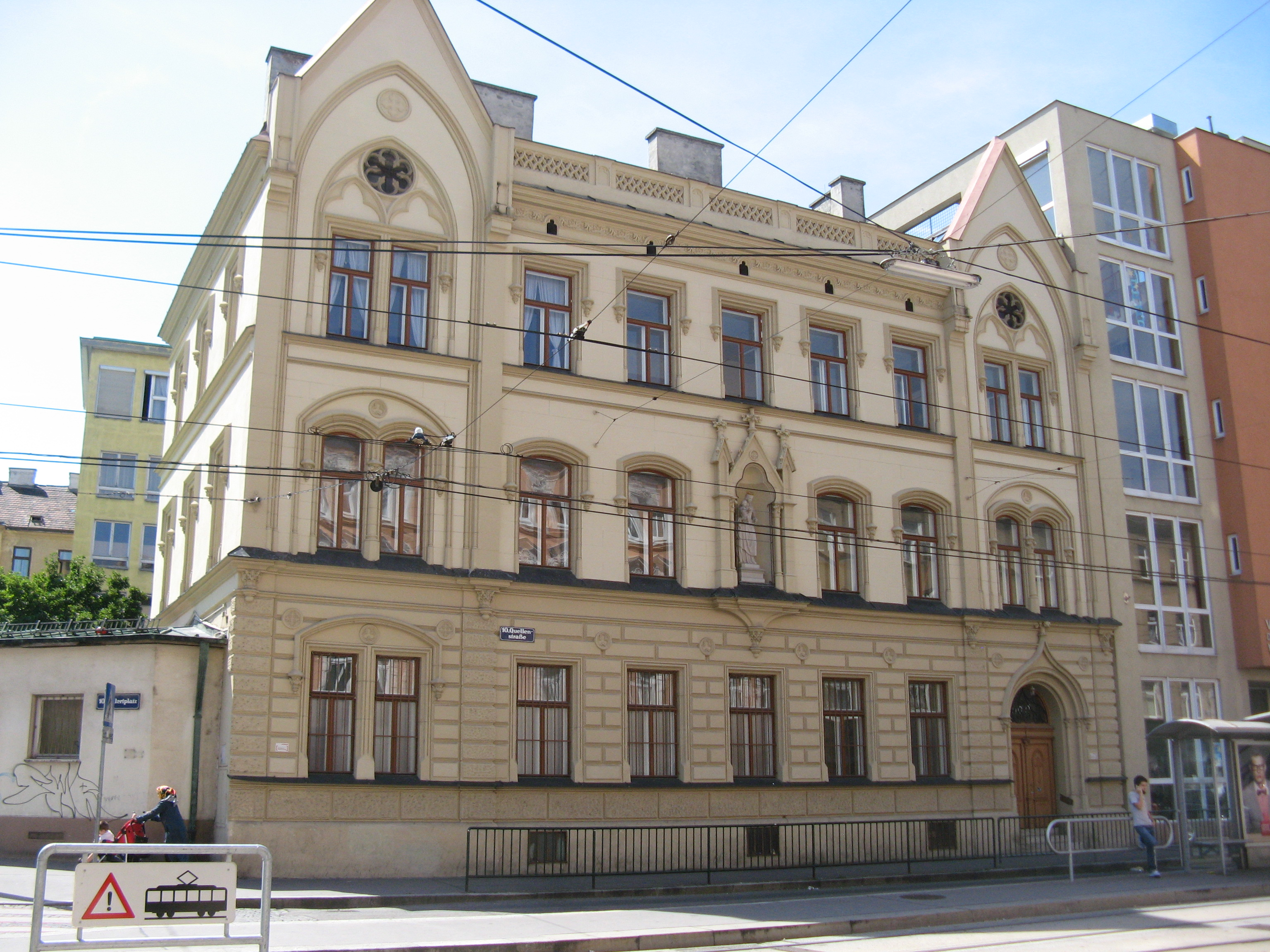 Klosterschule (1891), Quellenstraße 87, Wien-Favoriten